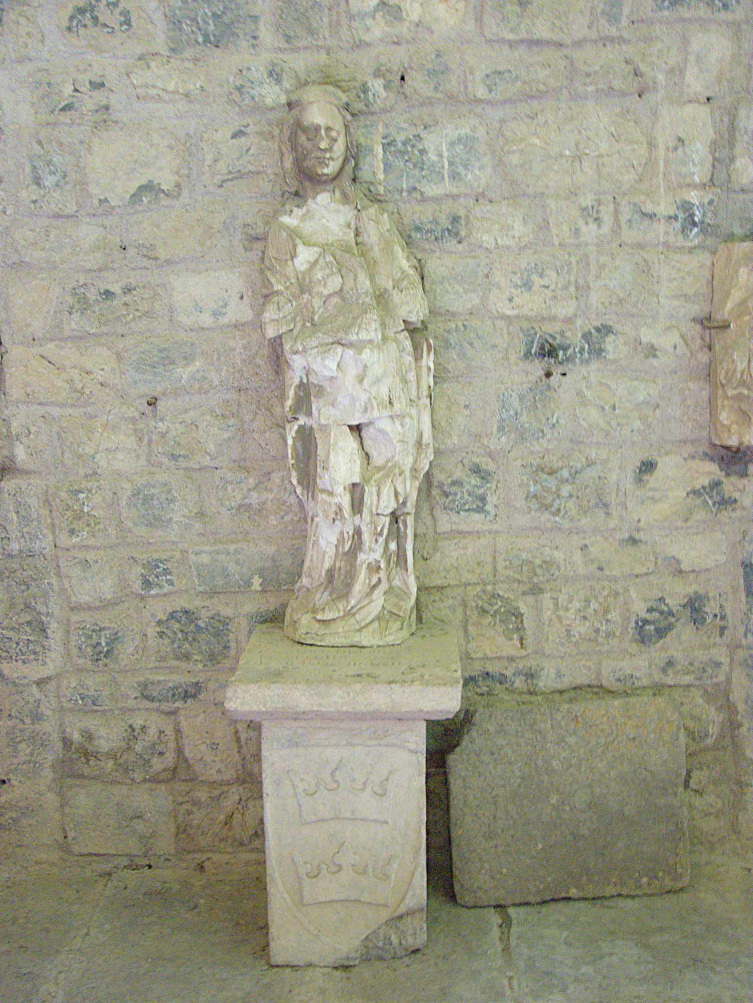 Estatua, monestir Sant Pere, Camprodon (Ripollès, Girona, Catalunya, Espanya)